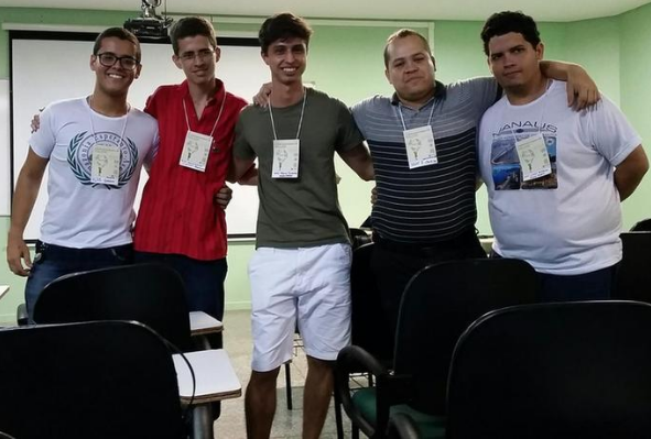 Partoprenintoj de la kvara konkurso